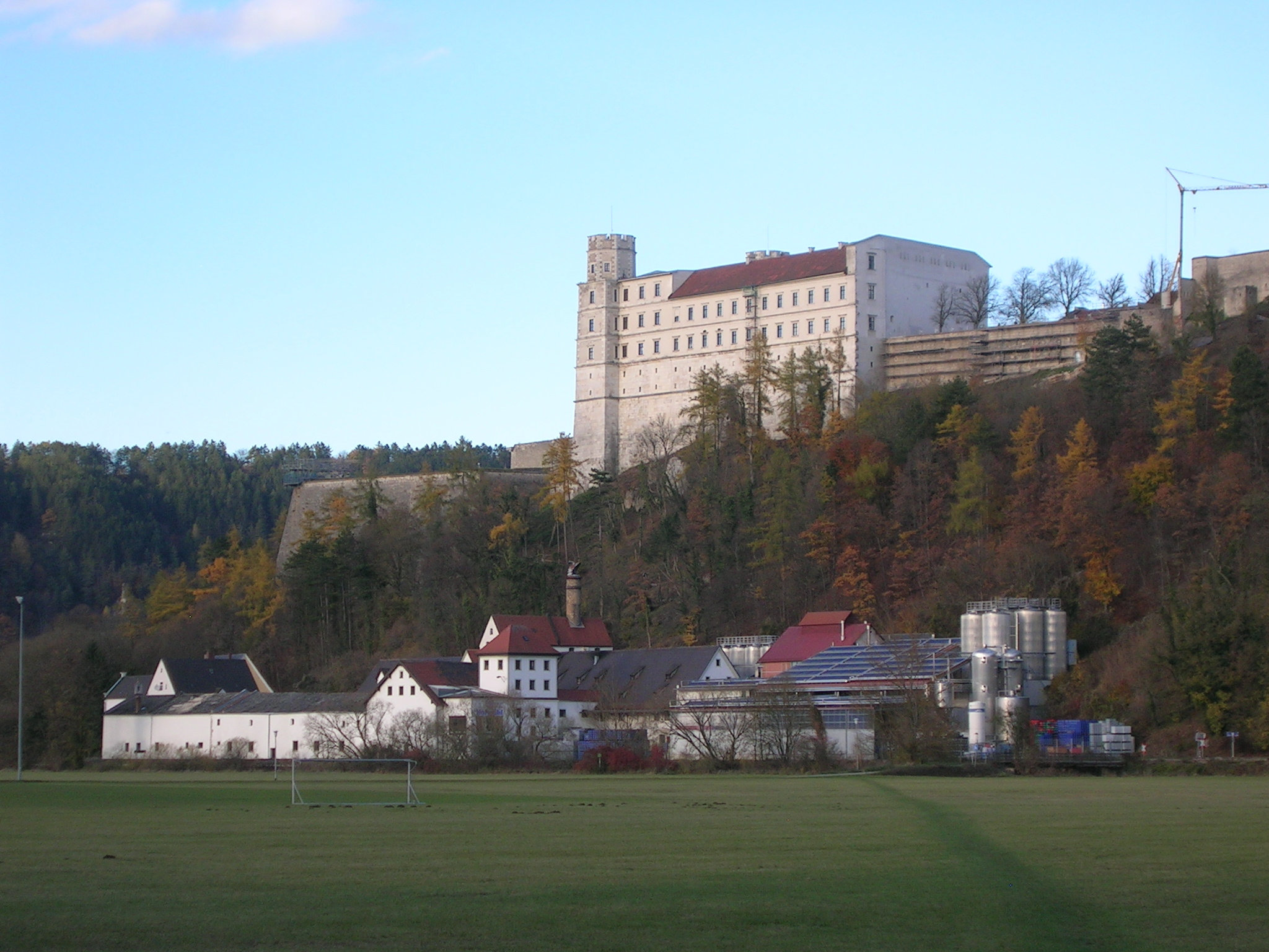 Rebdorf: Blick auf Willibaldsburg und Hofmühl.